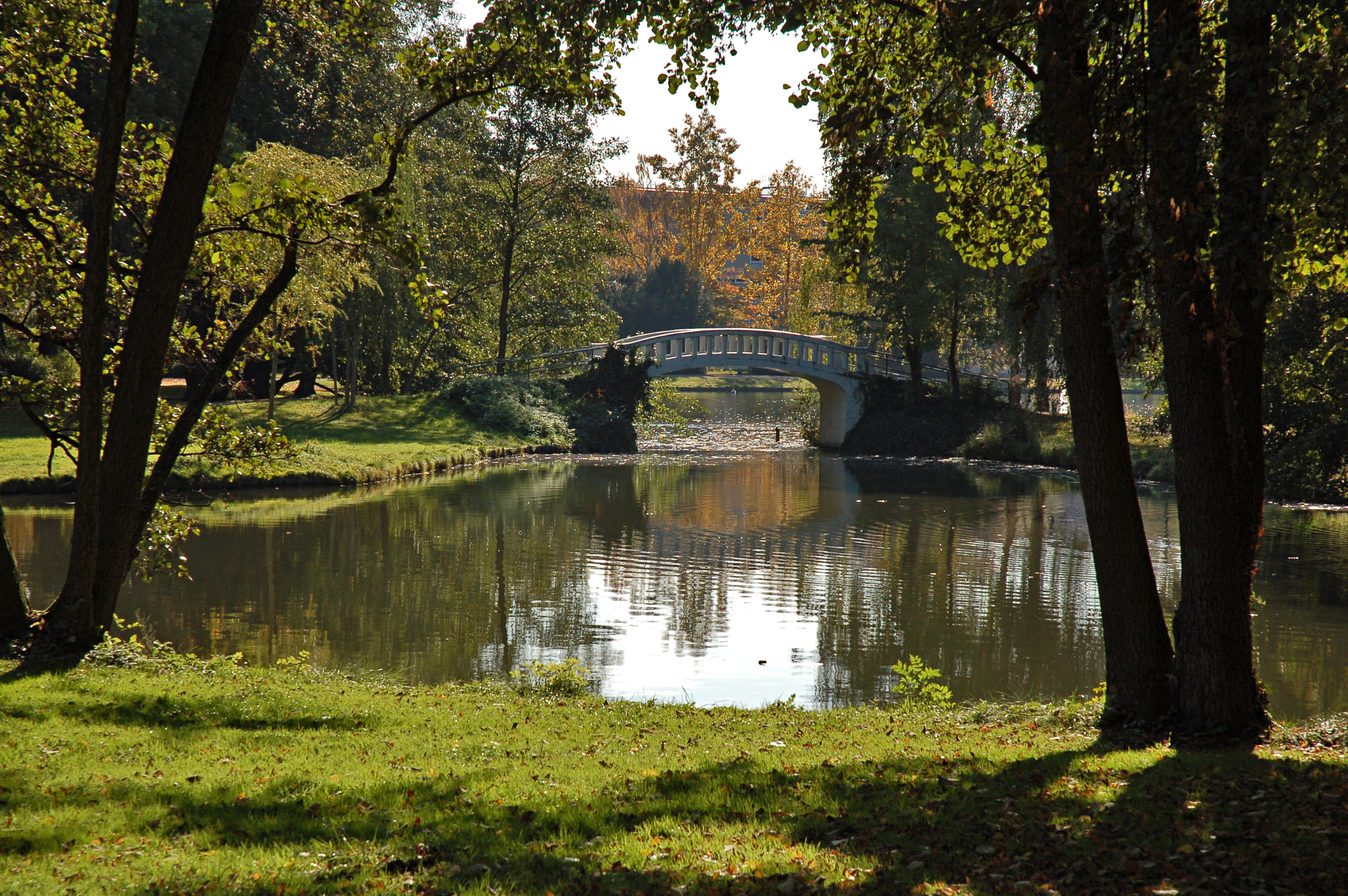 Ansichten aus dem Höchster Stadtpark